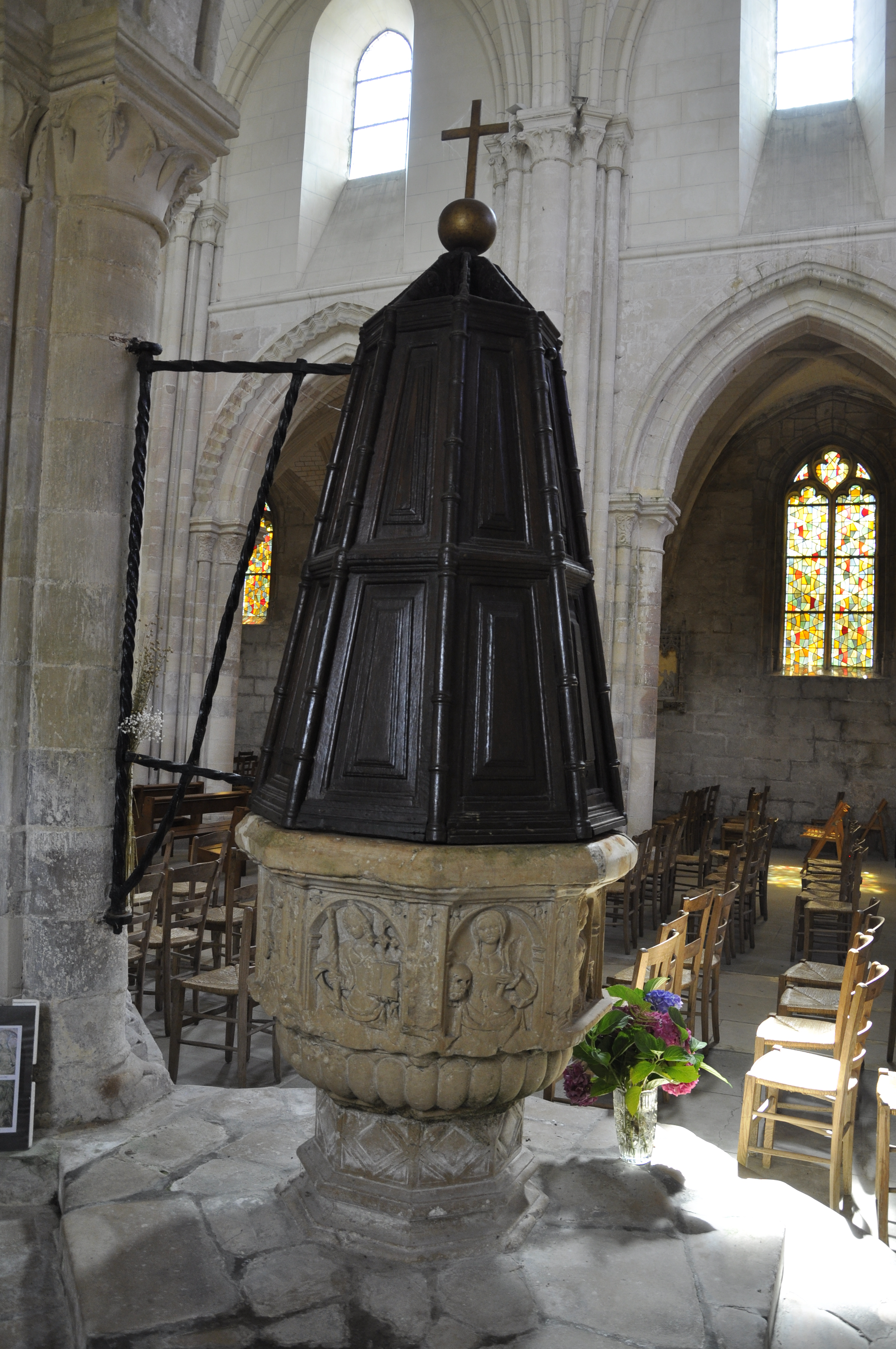 De doopvont van de Onze-Lieve-Vrouwekerk van Le Bourg-Dun, Frankrijk